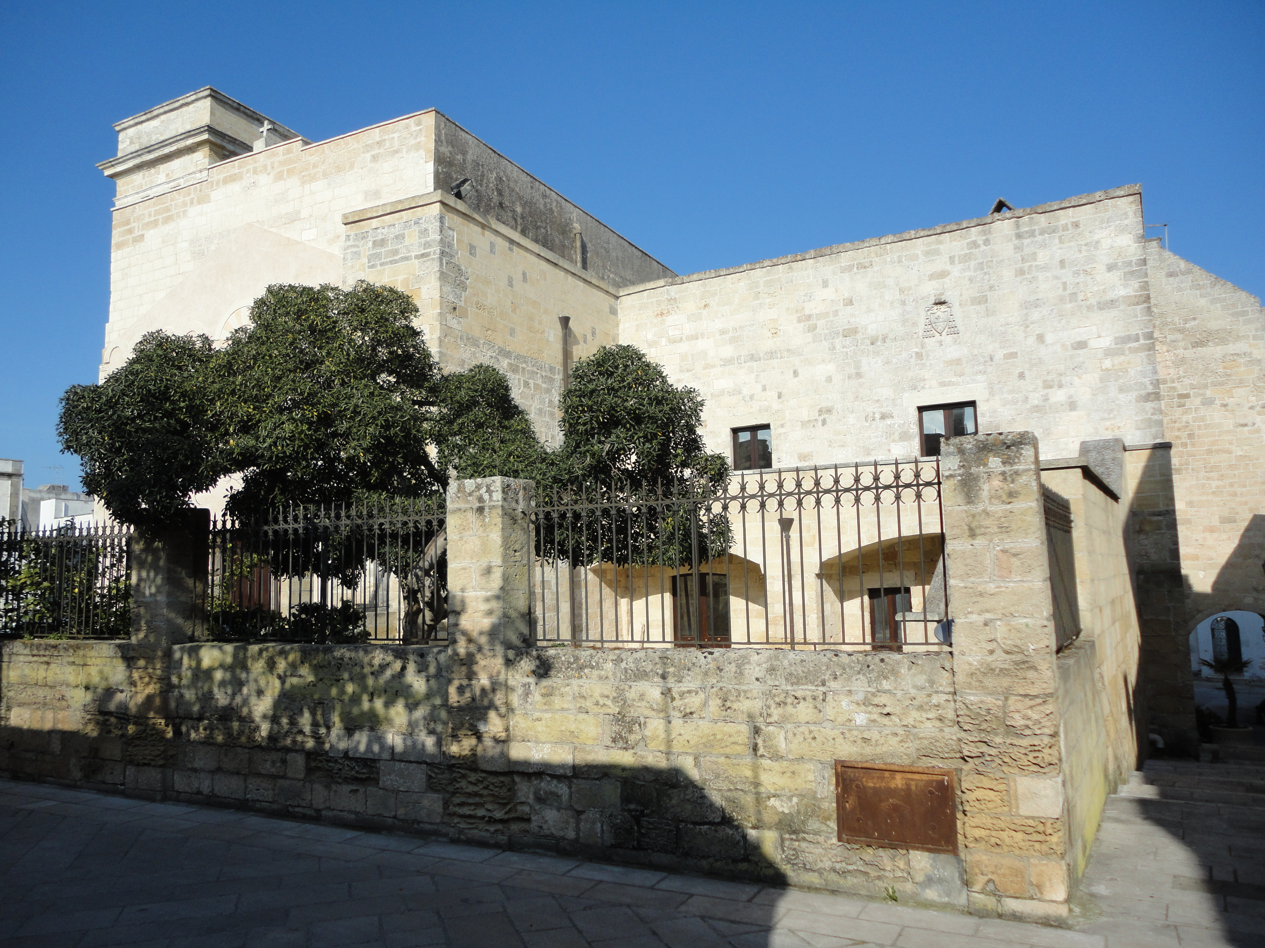 Palazzo del Vescovo Castro, Lecce